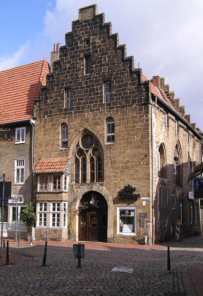 Die Alte Münze in Minden, Nordrhein-Westfalen. Das wohl kaum als Münze gedient habende Gebäude ist das älteste Steinhaus (nicht Kirche, Burg etc.) Westfalens.